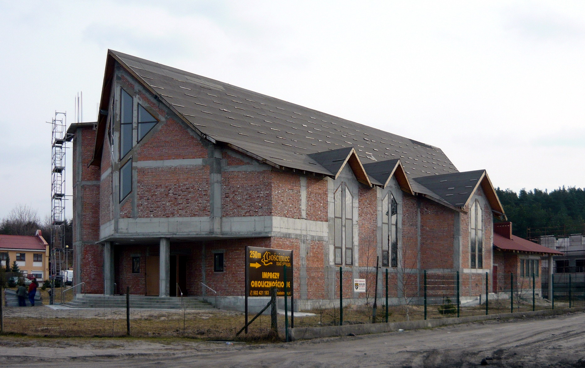 Nowy kościół parafii bł. Michała Kozala i Towarzyszy Diecezjalnych w Męczeństwie w Bydgoszczy - stan w marcu 2011 roku.